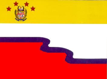 bandera del municipio tovar estado mérida